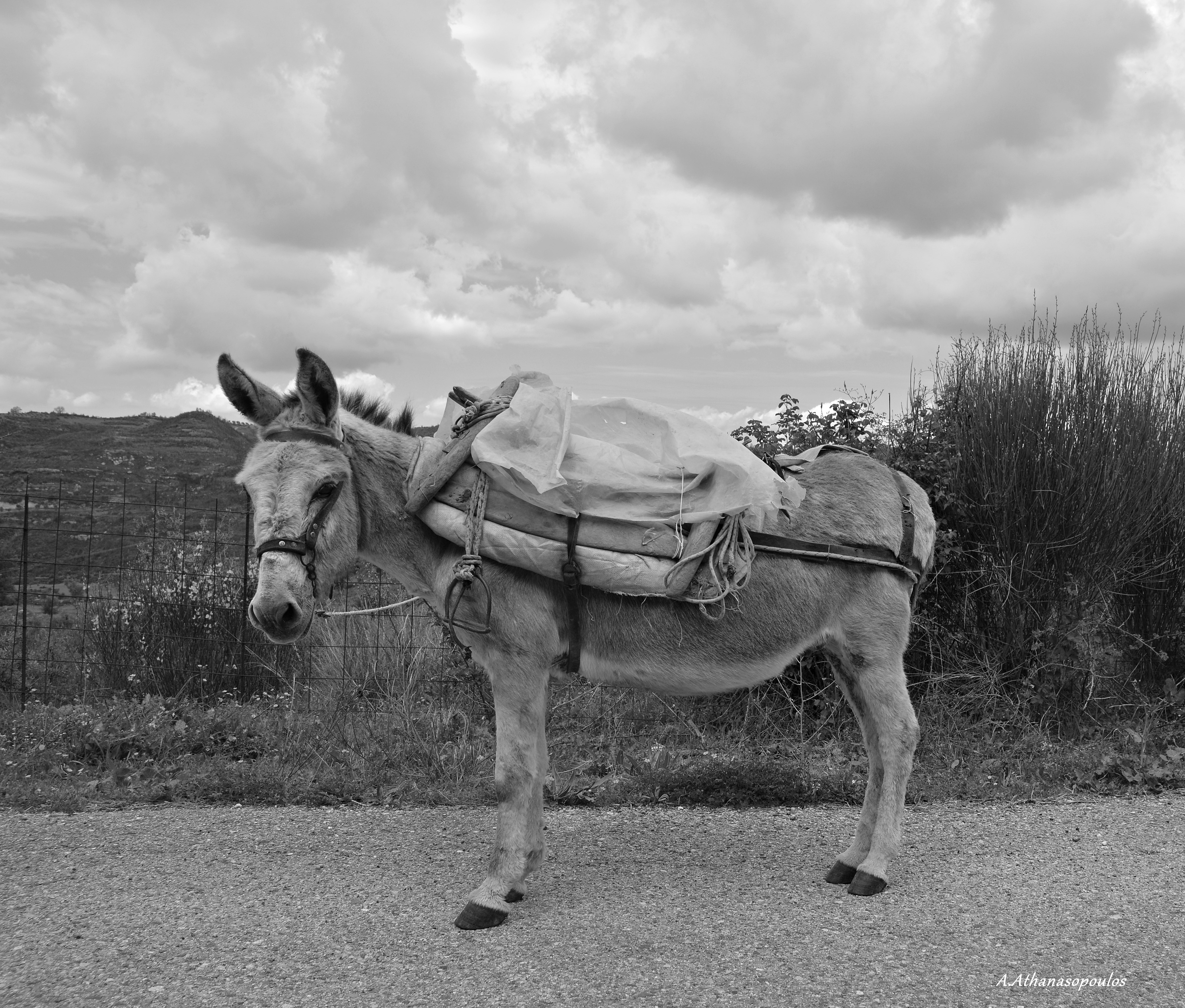 Τα χρησιμοποιούσαν οι χωρικοί για μεταφορές αγαθών και για να μεταφέρουν τους ίδιους This is a photography of Natura 2000 protected area with ID GR2330002